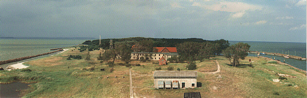 Blick über die Insel Ruden im Greifswalder Bodden (Mecklenburg-Vorpommern).